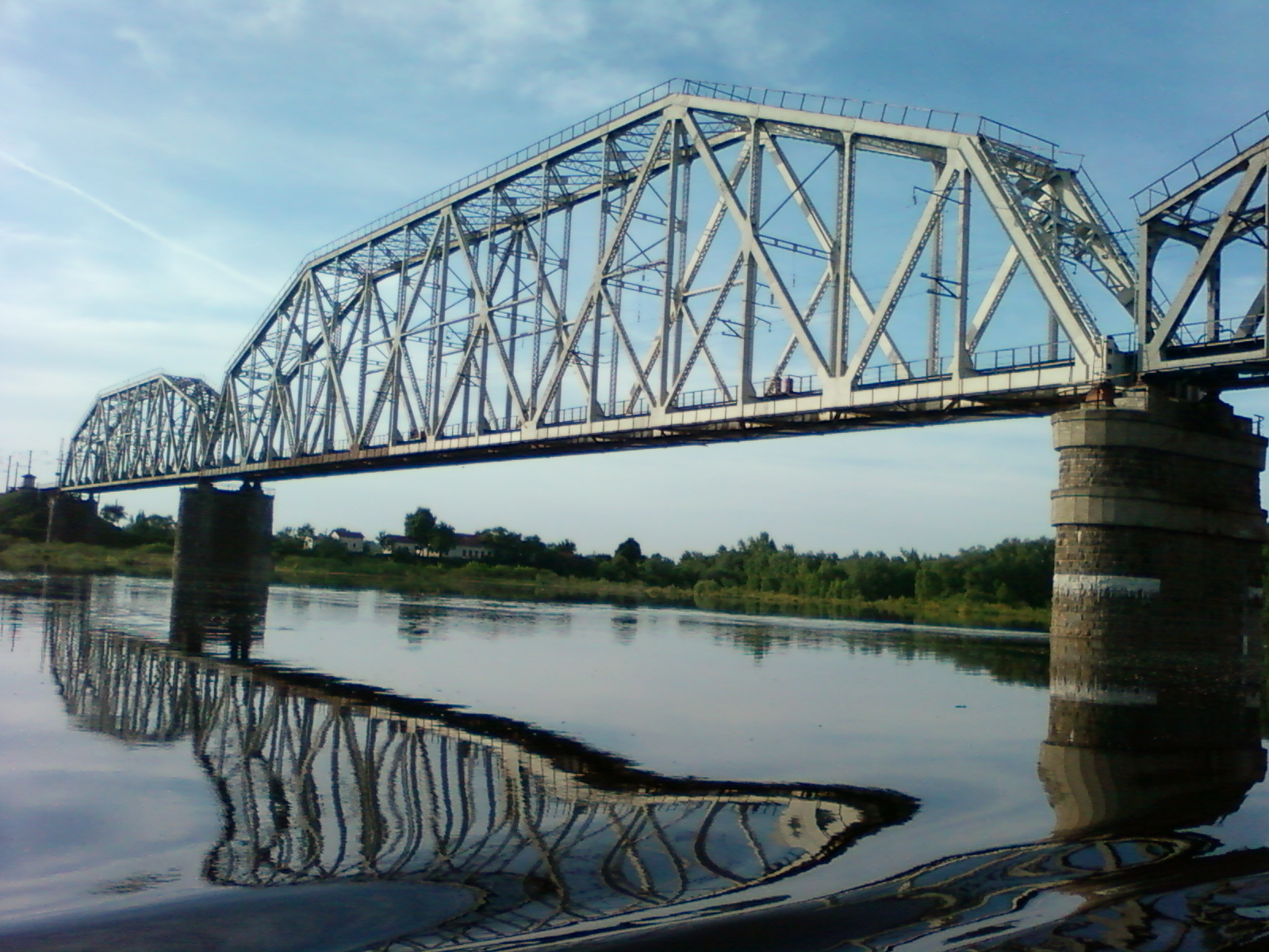 Міст через Десну 02